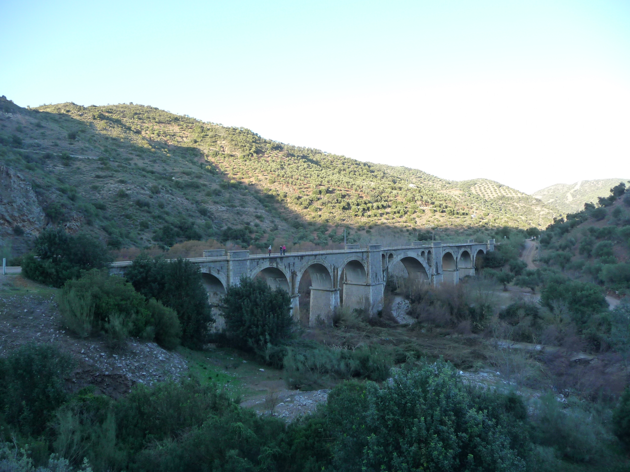 Coripe-P1050934.JPG